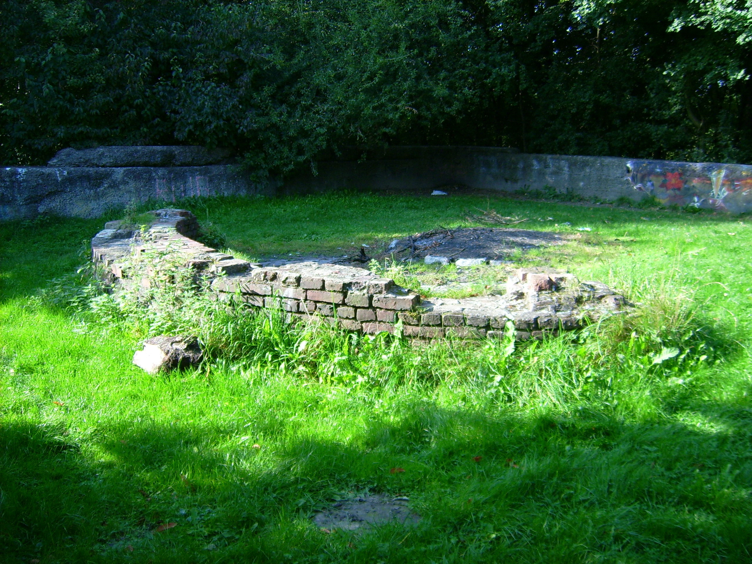 Schacht III der Zeche Maximilian in Hamm-Werries. Vordergrund: Der aus Ziegeln gemauerte Schachtring; Hintergrund: Fundament des Teufgerüsts. Brachliegend seit 1921.